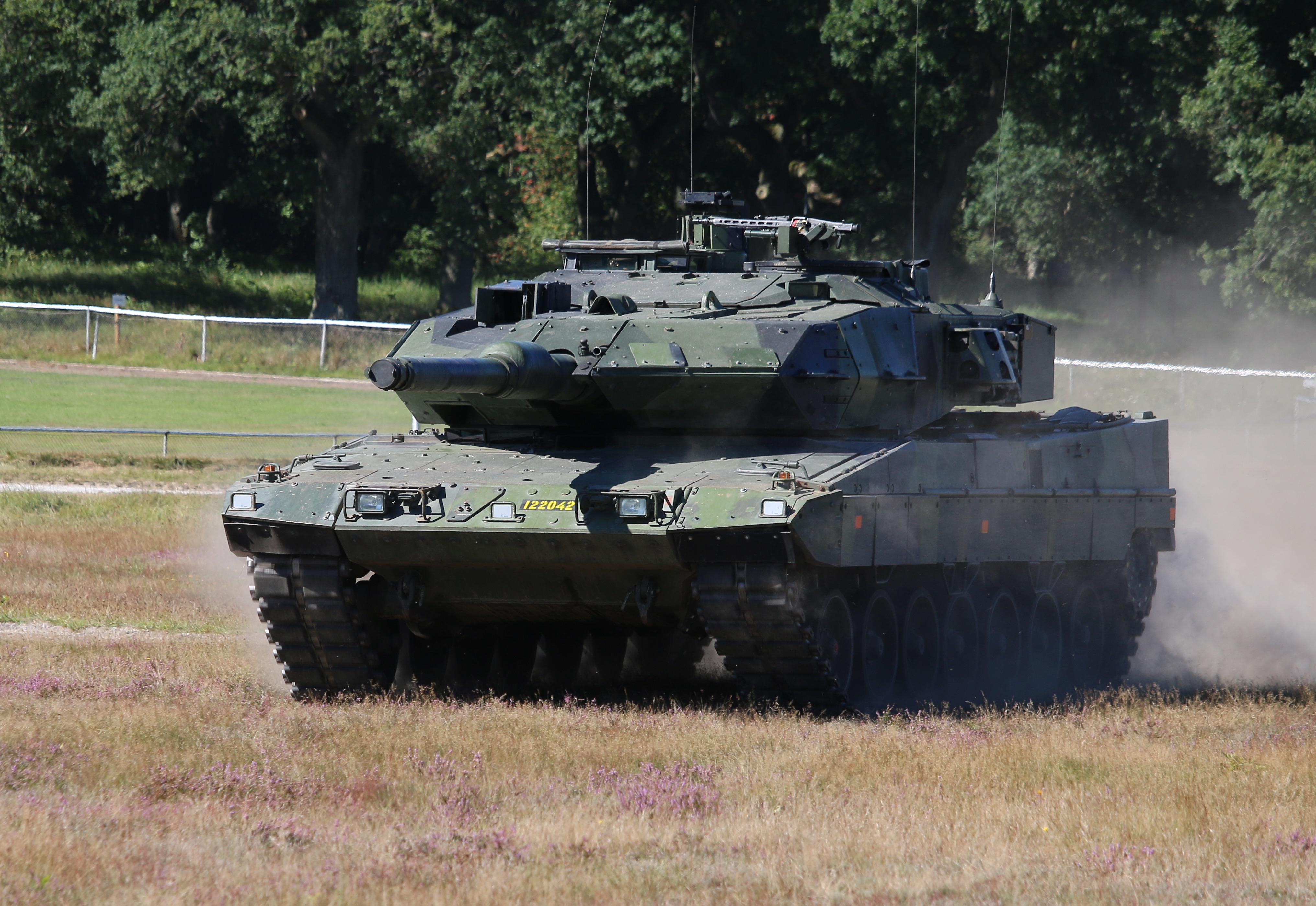 Stridsvagn 122 Revinge 2016